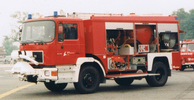 Pulverlöschfahrzeug (PLF) 3000 der Flughafenfeuerwehr Schönefeld